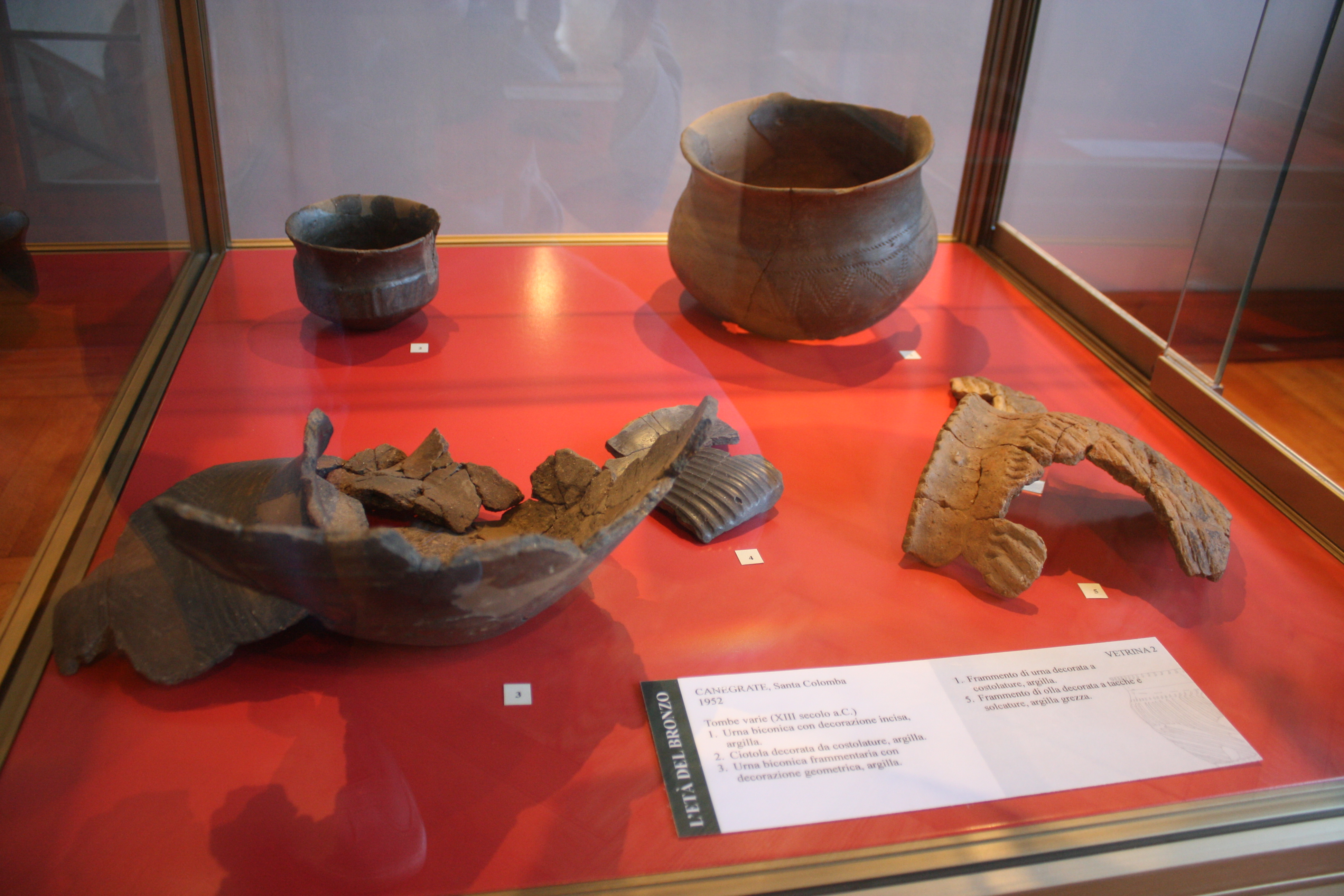 Ritrovamenti collegabili alla Cultura di Canegrate (XIII sec. a.C.) rinvenuti nel 1953 a Canegrate in zona Santa Colomba